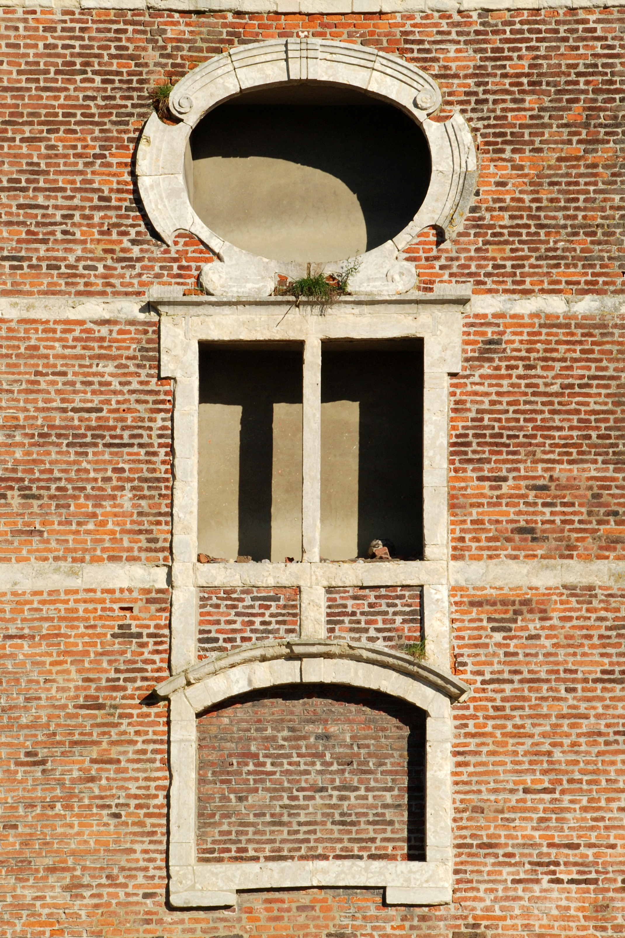 Belgique - Wallonie - Wavre - Église Saint-Martin de Limal